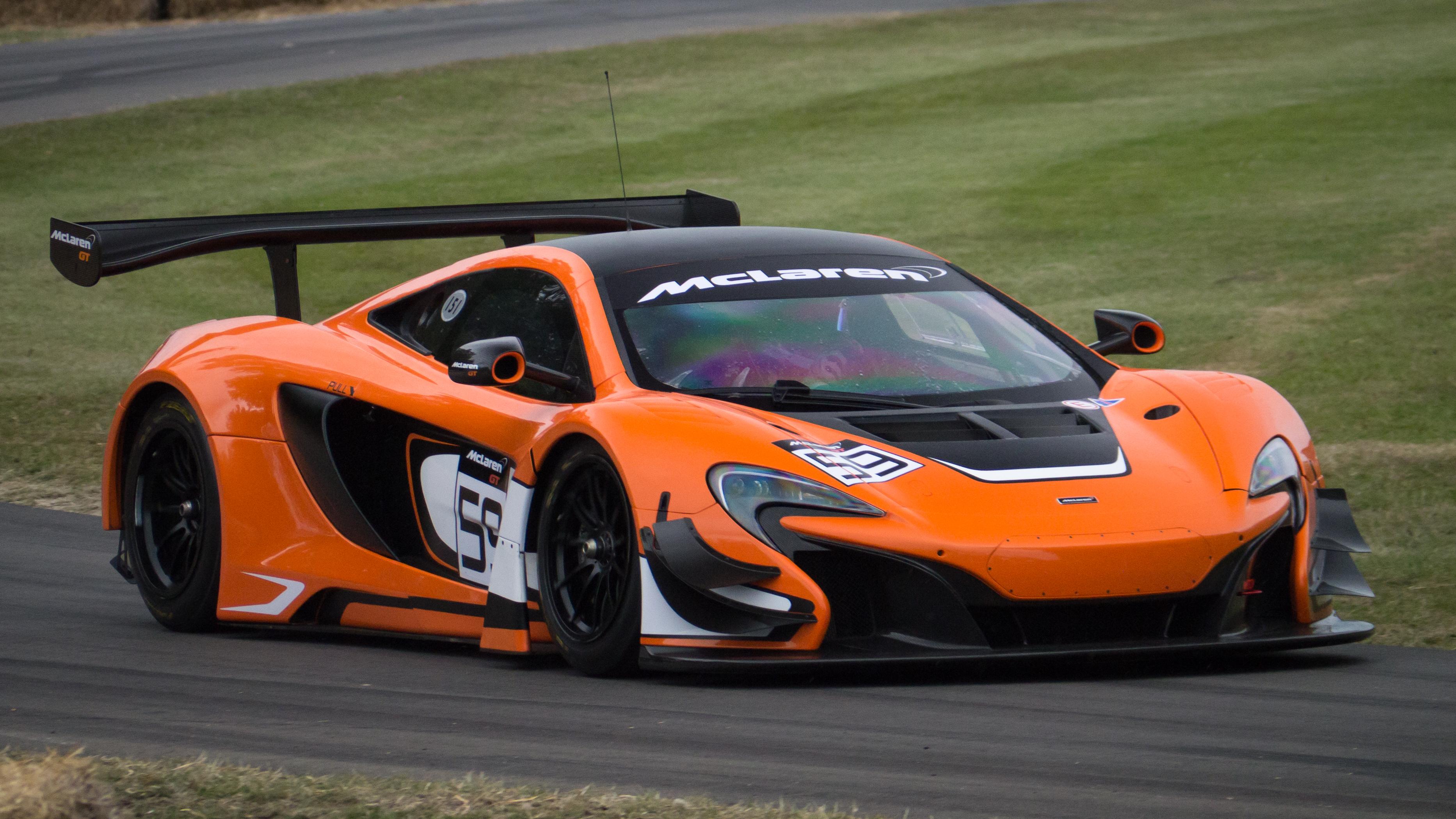 2015 McLaren 650S GT3